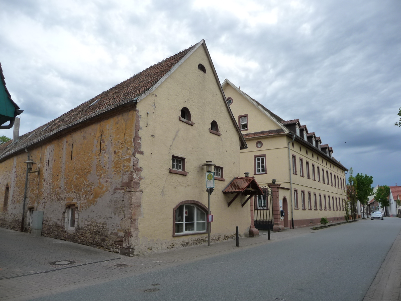 Obersülzen, Hauptstraße 52: Ehemaliges Hofgut Stauffer